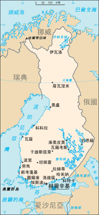 芬蘭地圖。